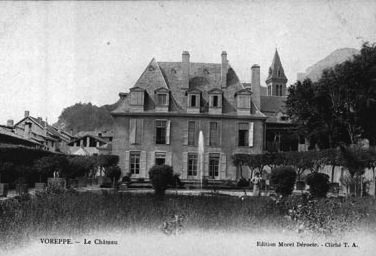 château de Siéyès, à Voreppe, carte postale du début du XX siècle.